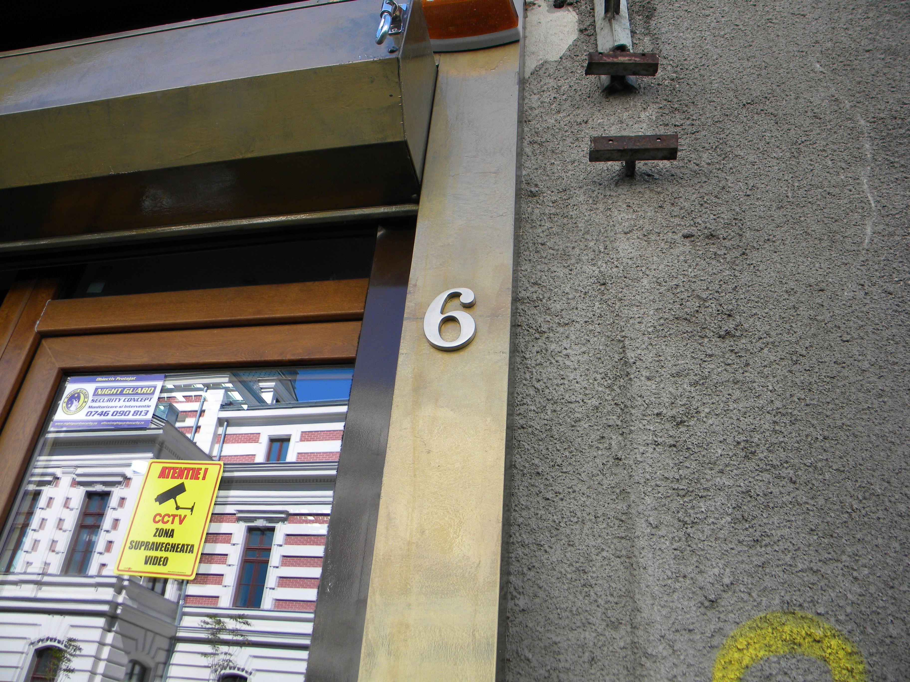 Bucuresti, Romania, Casa pe Str. Coltei nr. 6, sect. 3 (detaliu)